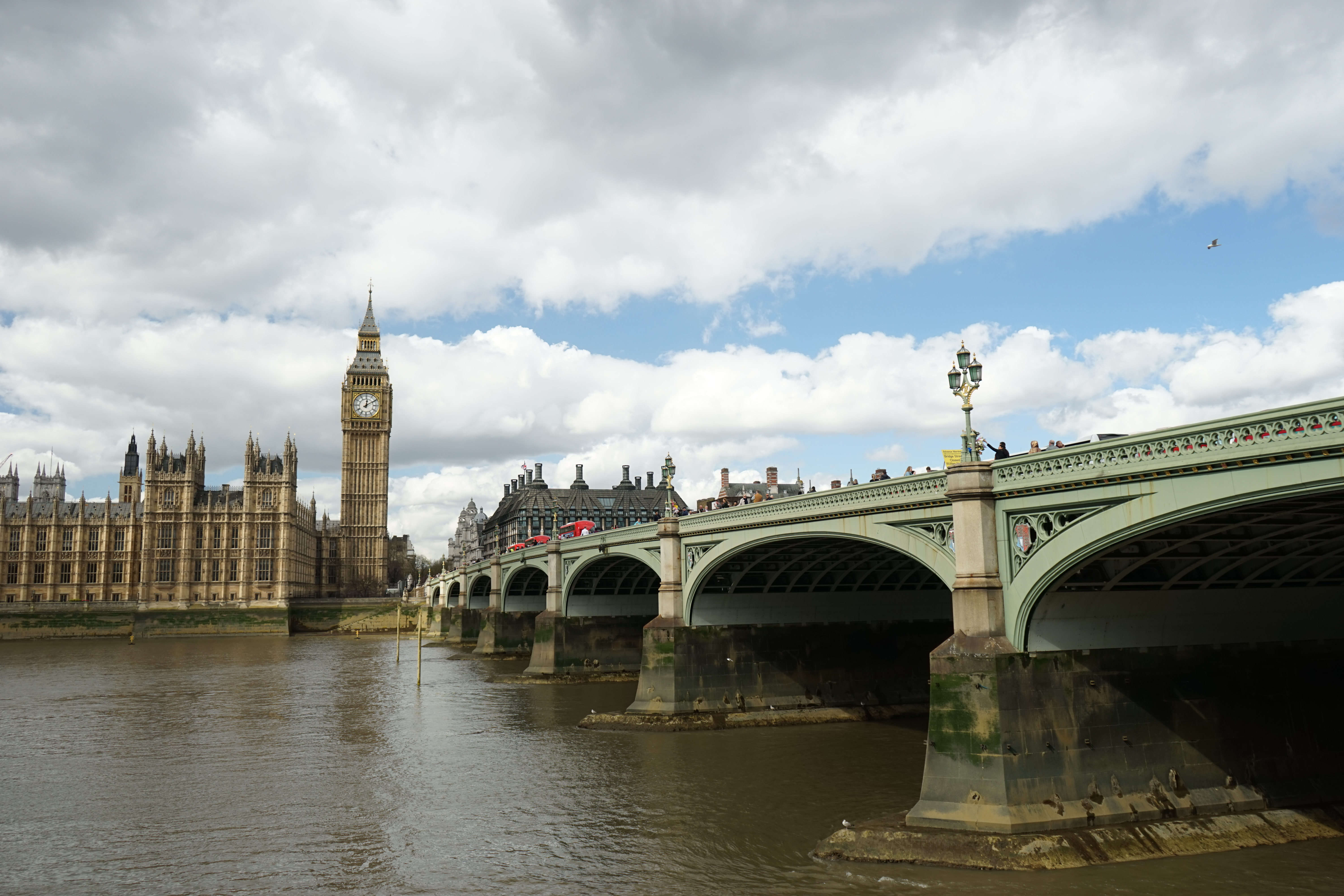 Westminster, London